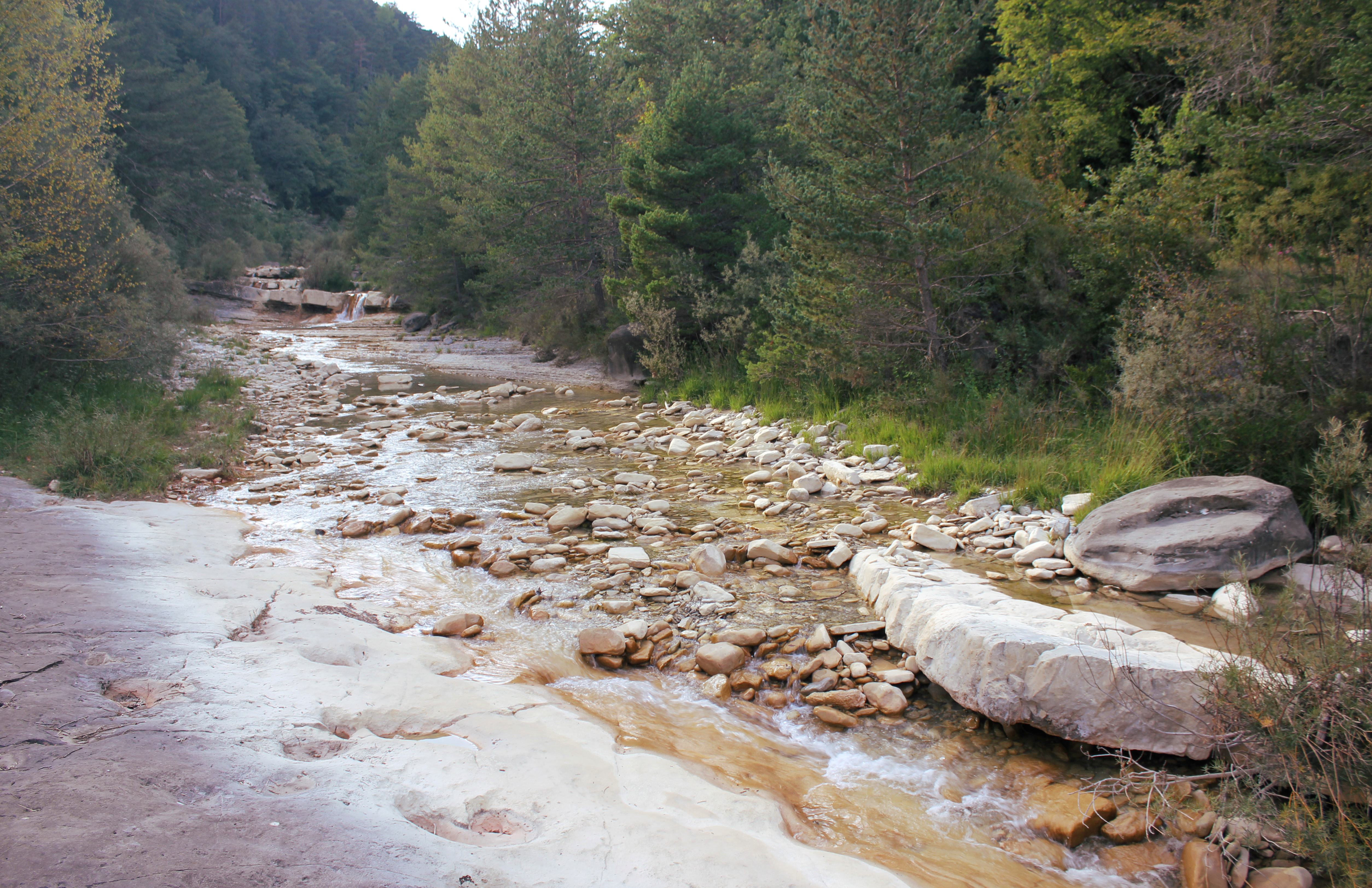 Aragonés: O río Forcos en o parache d'as palancas de Bergua, a on se bifurca os camins d'Escartín y de Basarán, chusto antes que l'arribe as auguas d'o barranco de la Pera.